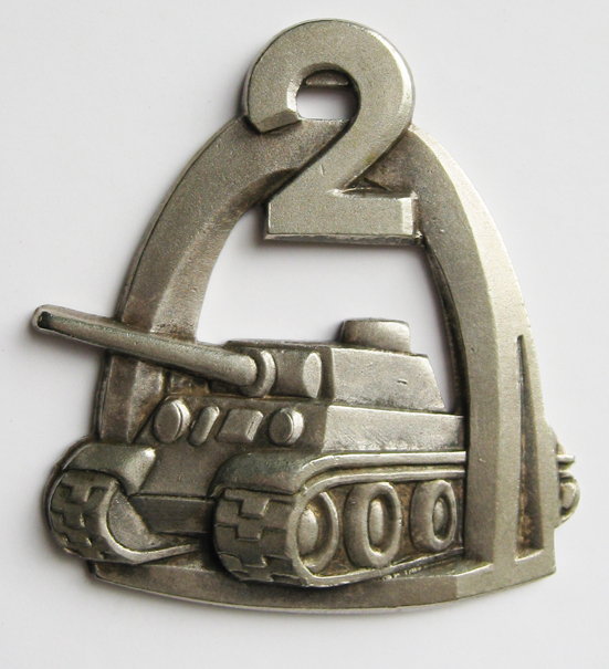 Odznaka ma formę kompozycji składającej się ze strzemienia i czołgu. Na kabłąku strzemienia wpisano numer 2. Wymiary: 46x42 mm. Odznakę projektowali Bronisław Rakowski i Mieczysław Białkiewicz. Wykonanie: F.M. Lorioli Fratelli - Milano - Roma Odznaki wykonywane były także w srebrze lub metodą odlewu z miękkiego materiału w warsztatach remontowo-naprawczych. Zatwierdzona Dz. Rozk. Dowódcy 2 Korpusu nr 76, poz. 415 z 18 czerwca 1946 r